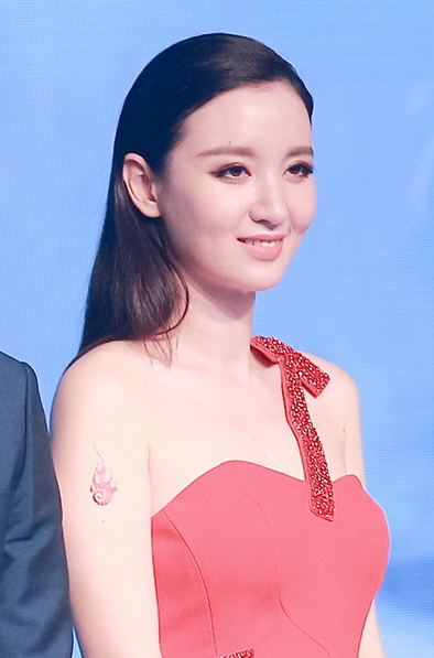 150812 《幻城》发布会